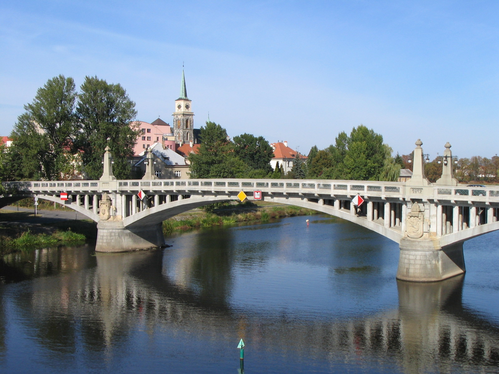 Za mostem gotický cihlový kostel svatého Jiljí.